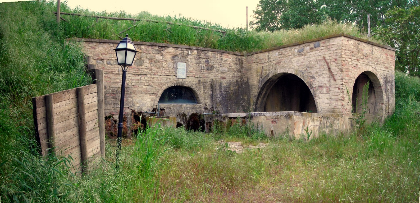 source of San Costanzo, Castello delle Forme, Marsciano, Perugia, Umbria, Italy